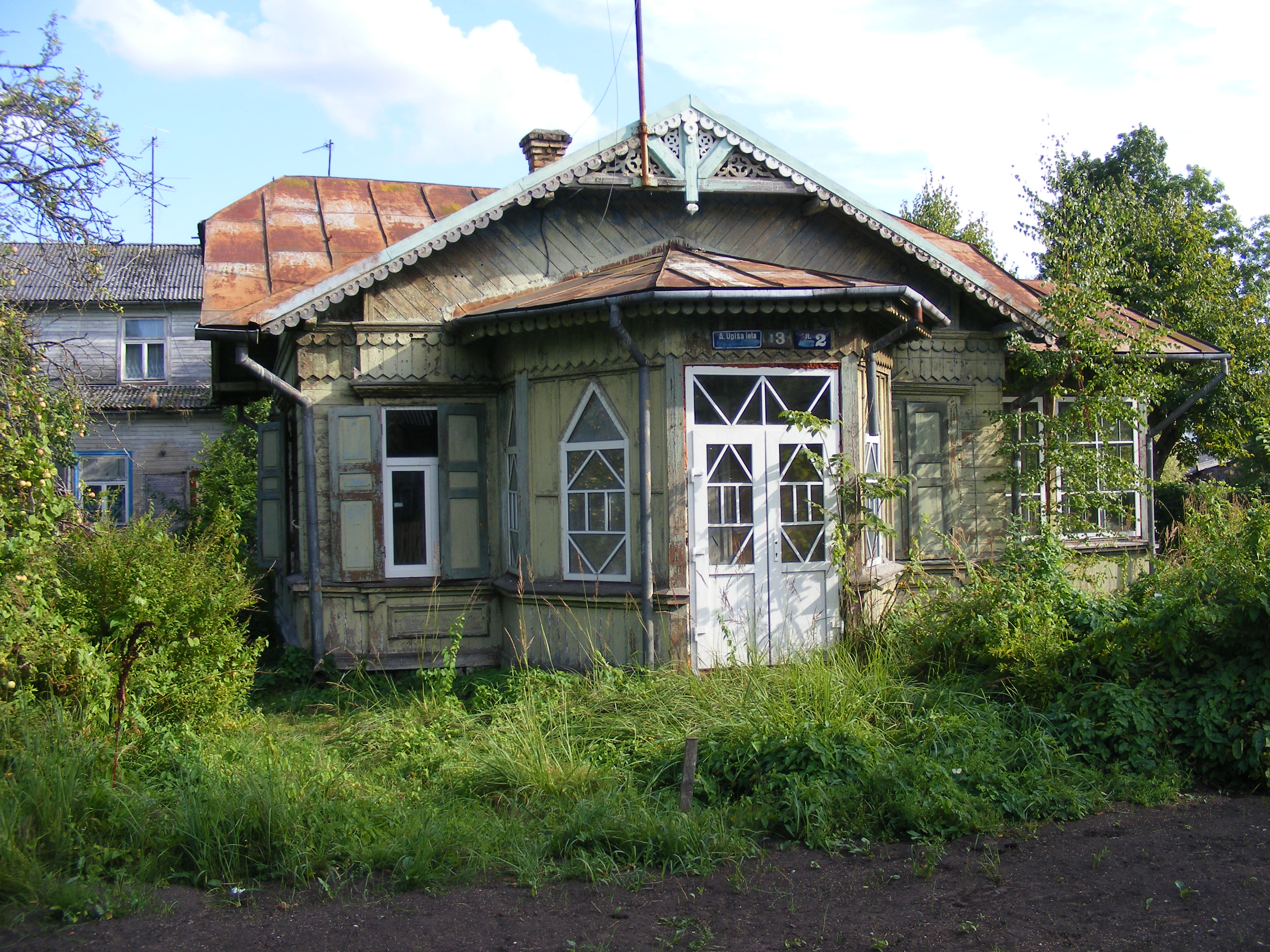 Andreja Upīša iela 13 k-2, Ķemeri, Jūrmala